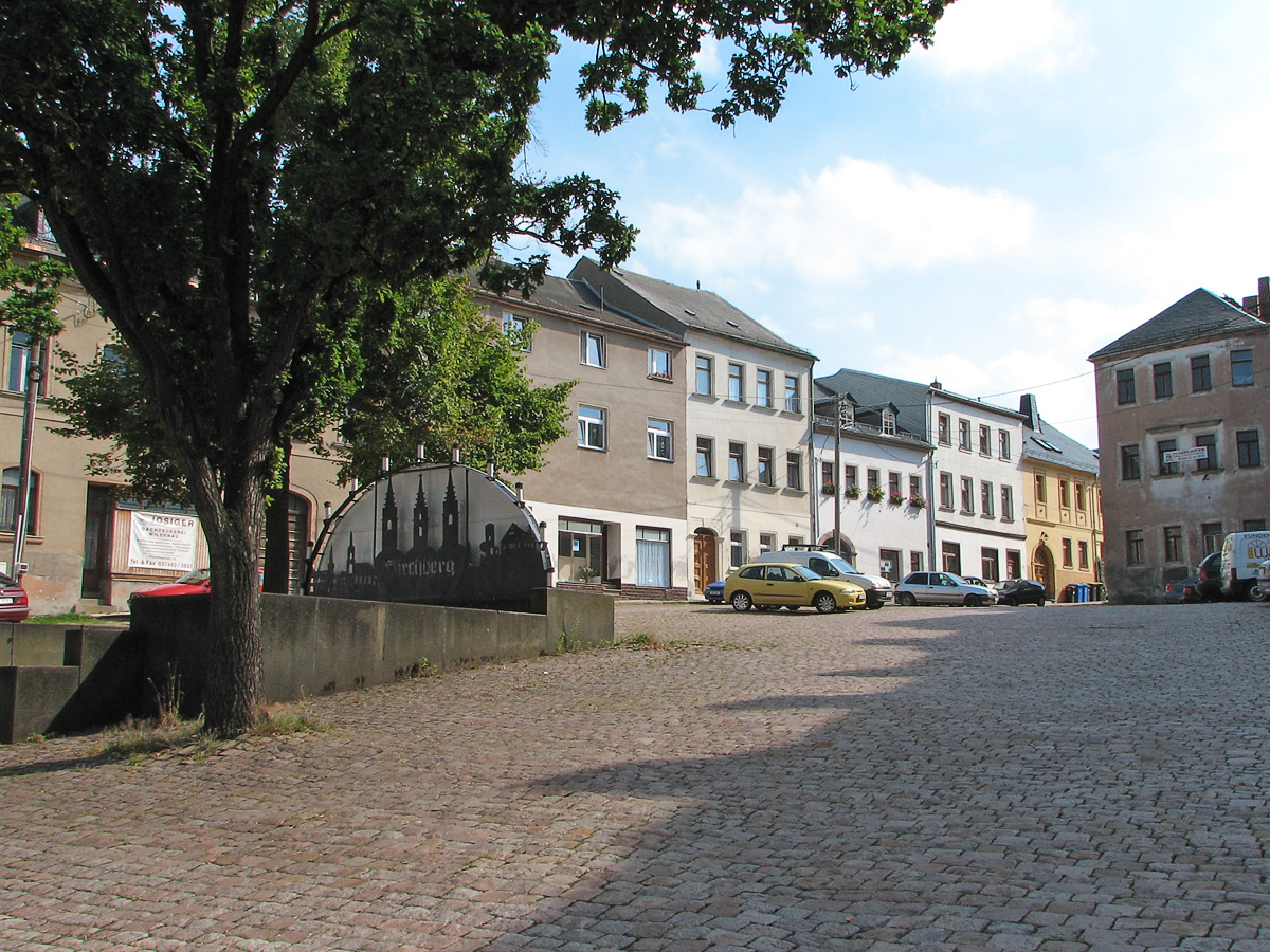 Beschreibung: Alter Markt - old market / Kirchberg in Sachsen (Saxony, Germany) Fotograf: Darkone, 28. August 2005